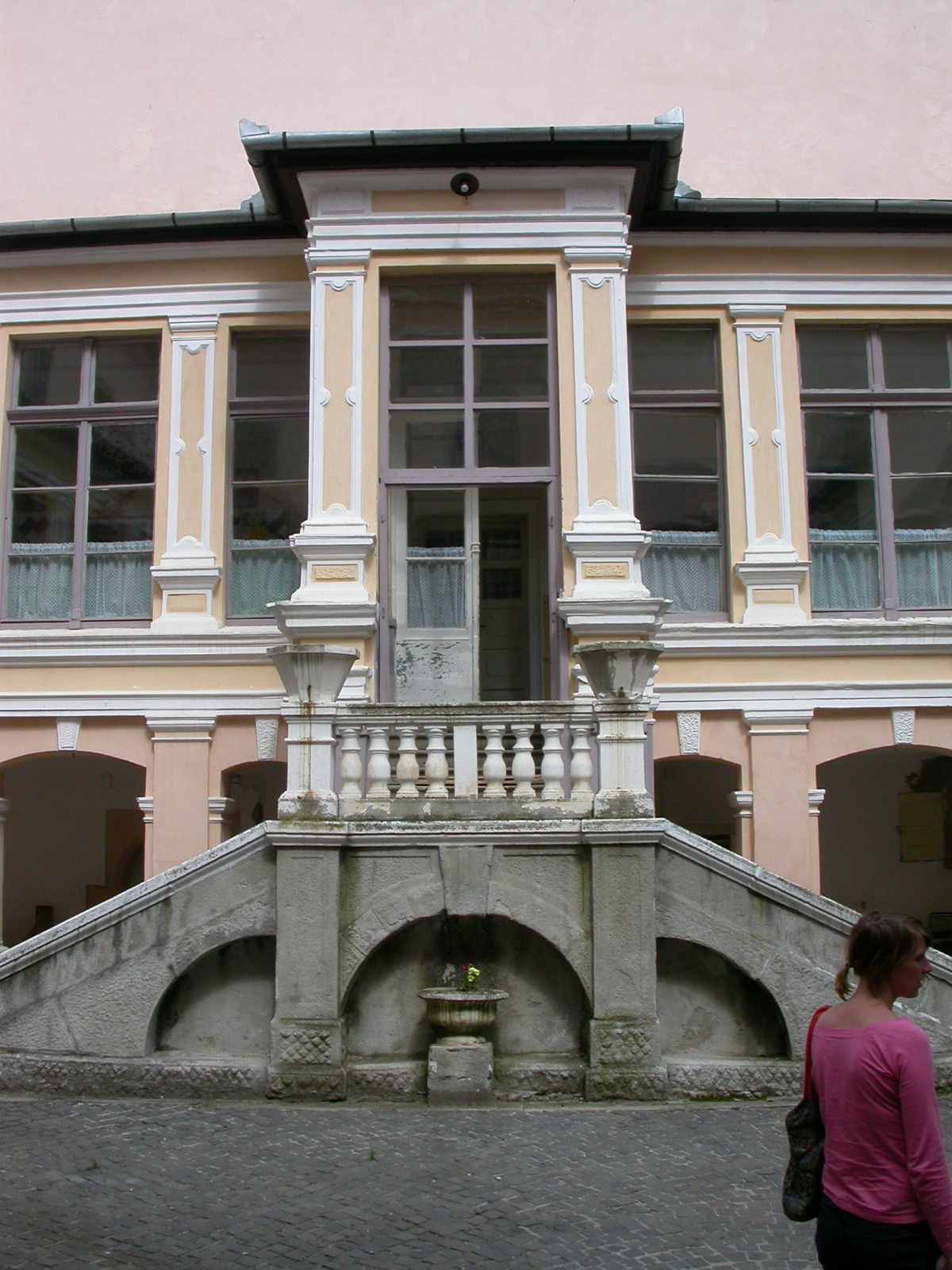 Ansamblul castelului Kendy-Kemeny, sec. XVI, sec. XIX